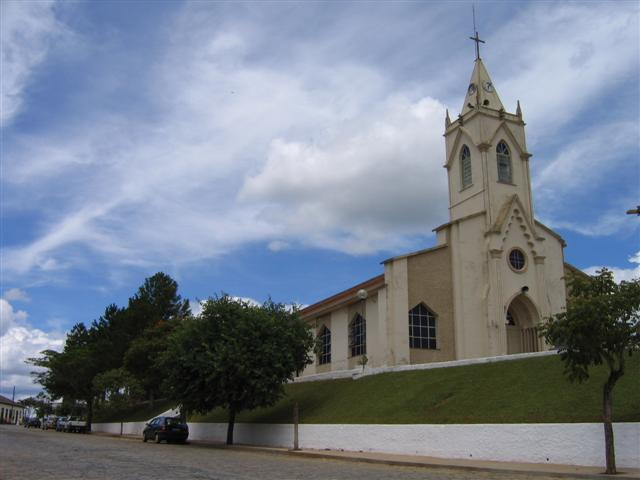 Foto da Igreja Matriz de São Vicente de Minas/MG